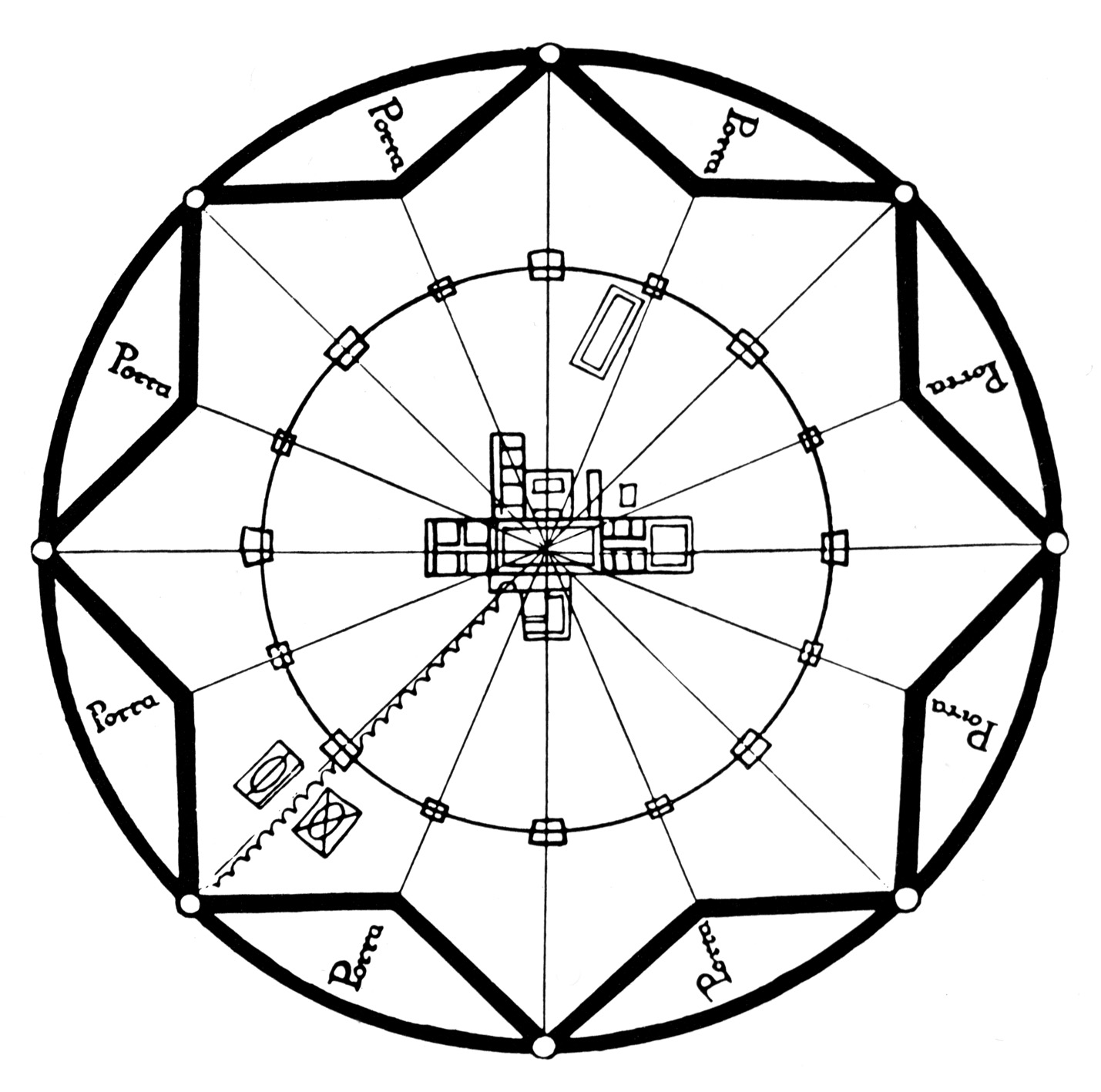 Plan der Idealstadt Sforzinda, 1457